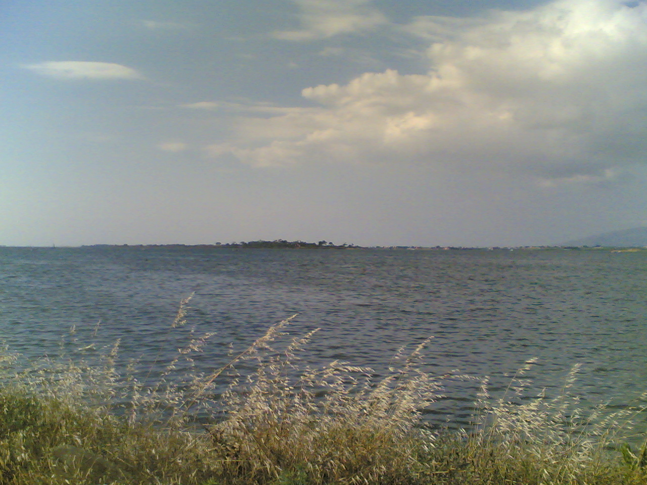 Scattata con il nokia 6630 l'11 giugno 2006.